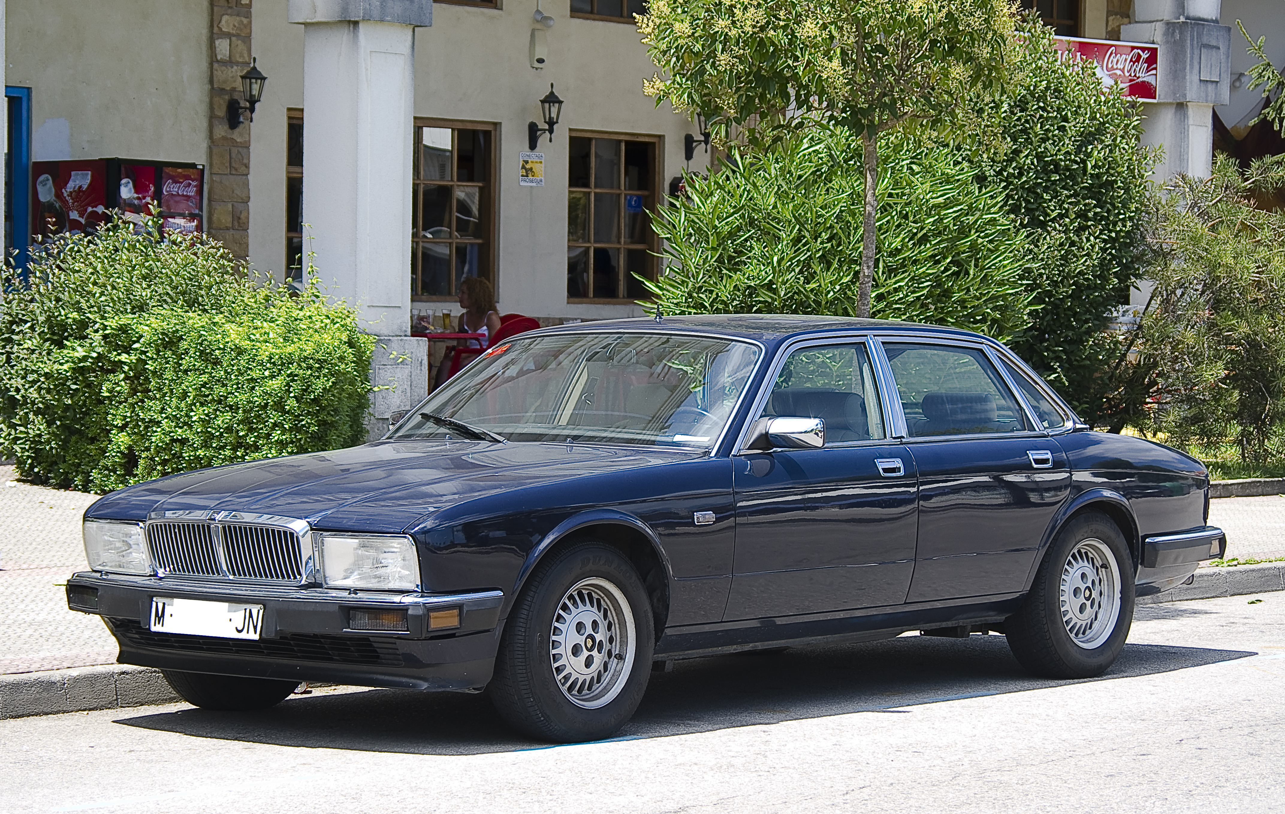 1989 Jaguar Sovereign